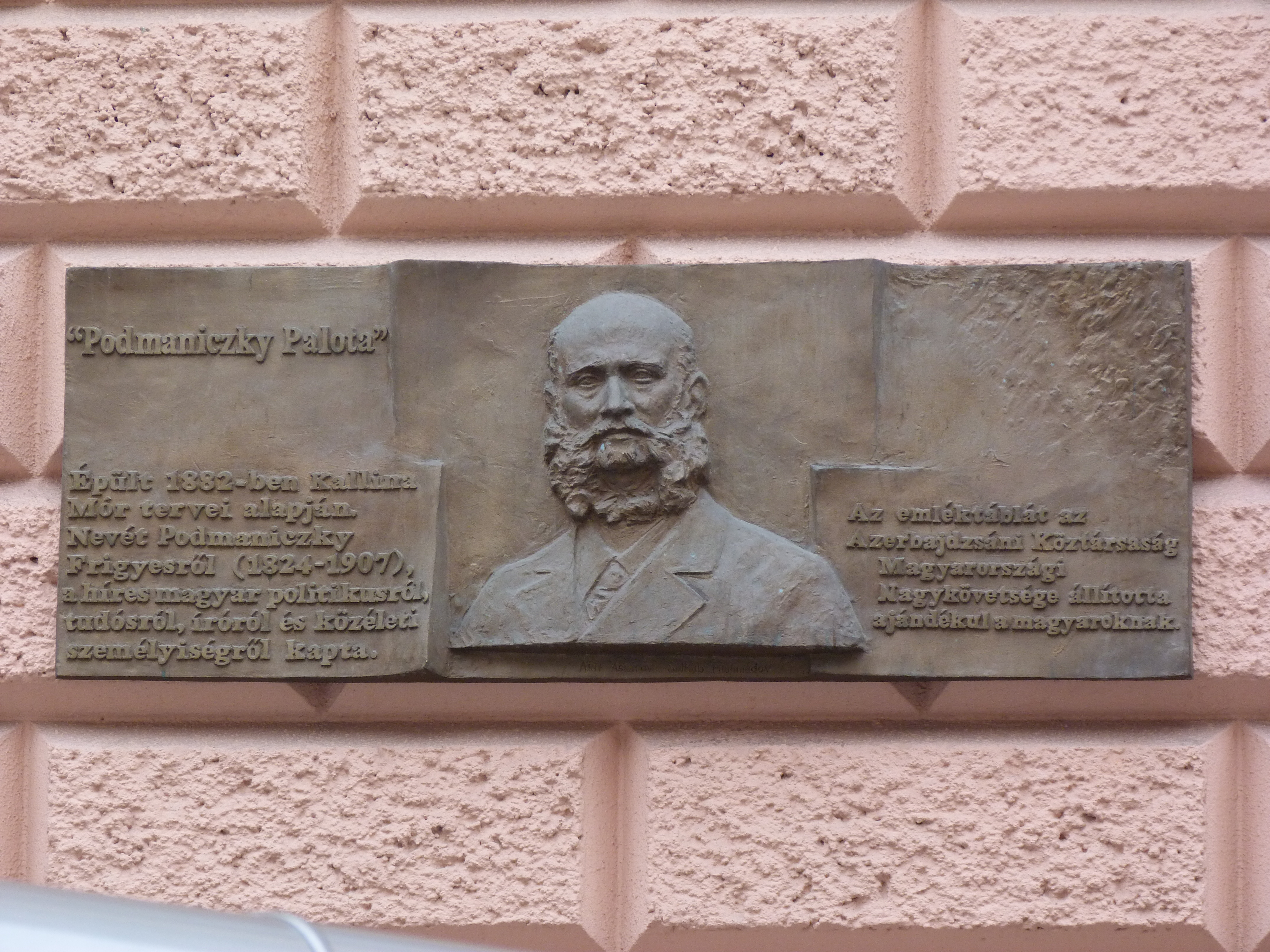 A felvétel 2013. január 14 -én készült Budapesten, a Terézvárosban. Az Eötvös utca 14 szám alatti ház falán Podmaniczky Frigyes emléktáblája.